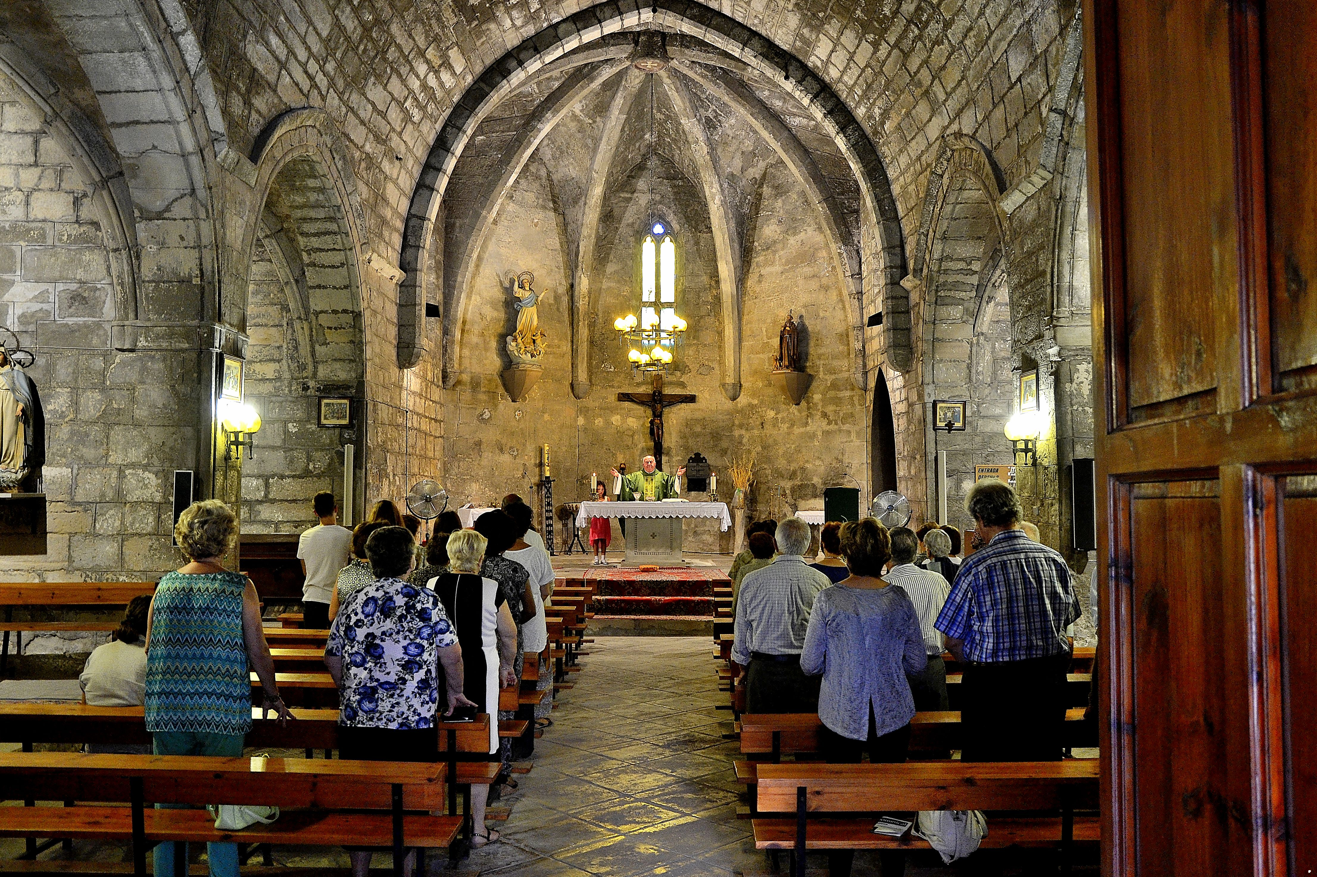 Santa María de la Asunción de Sarroca.